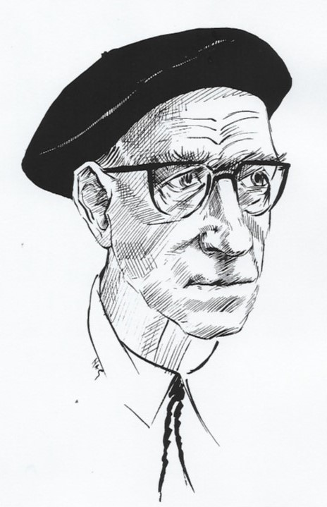 Portrait dessiné du Docteur Léon Pales, à la fin de sa vie, portant un béret pyrénéen